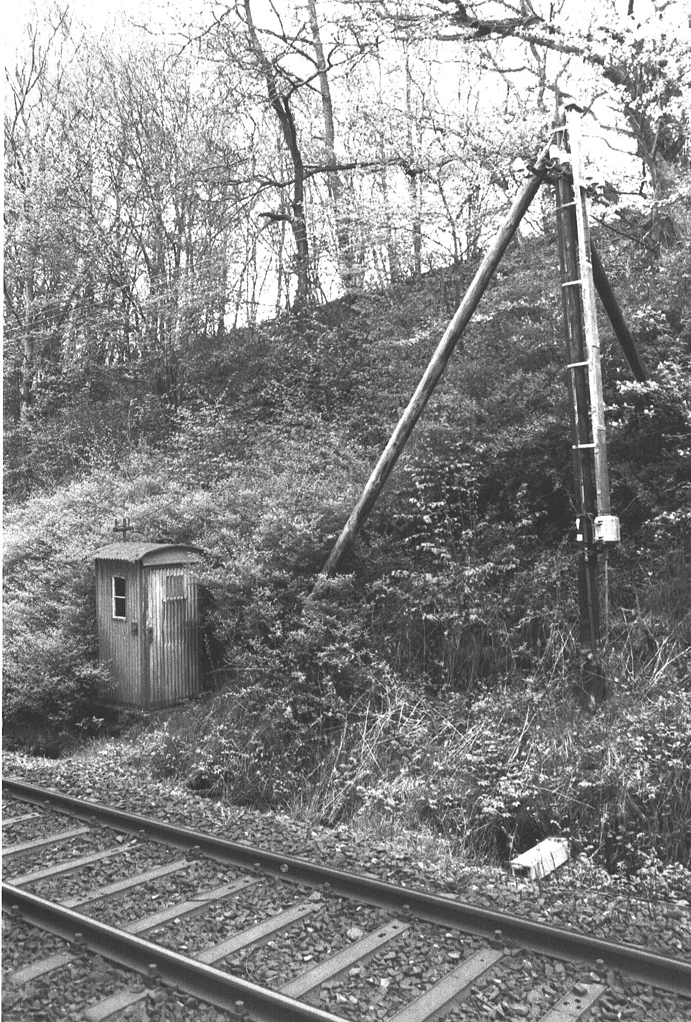 Sichtbare Elemente des bahneigenen Fernsprechsystems (Basa) mit Telegraphenleitung und Fernsprechbude, die oft an Signalen vorzufinden waren, An der Bude fehlt das "F".